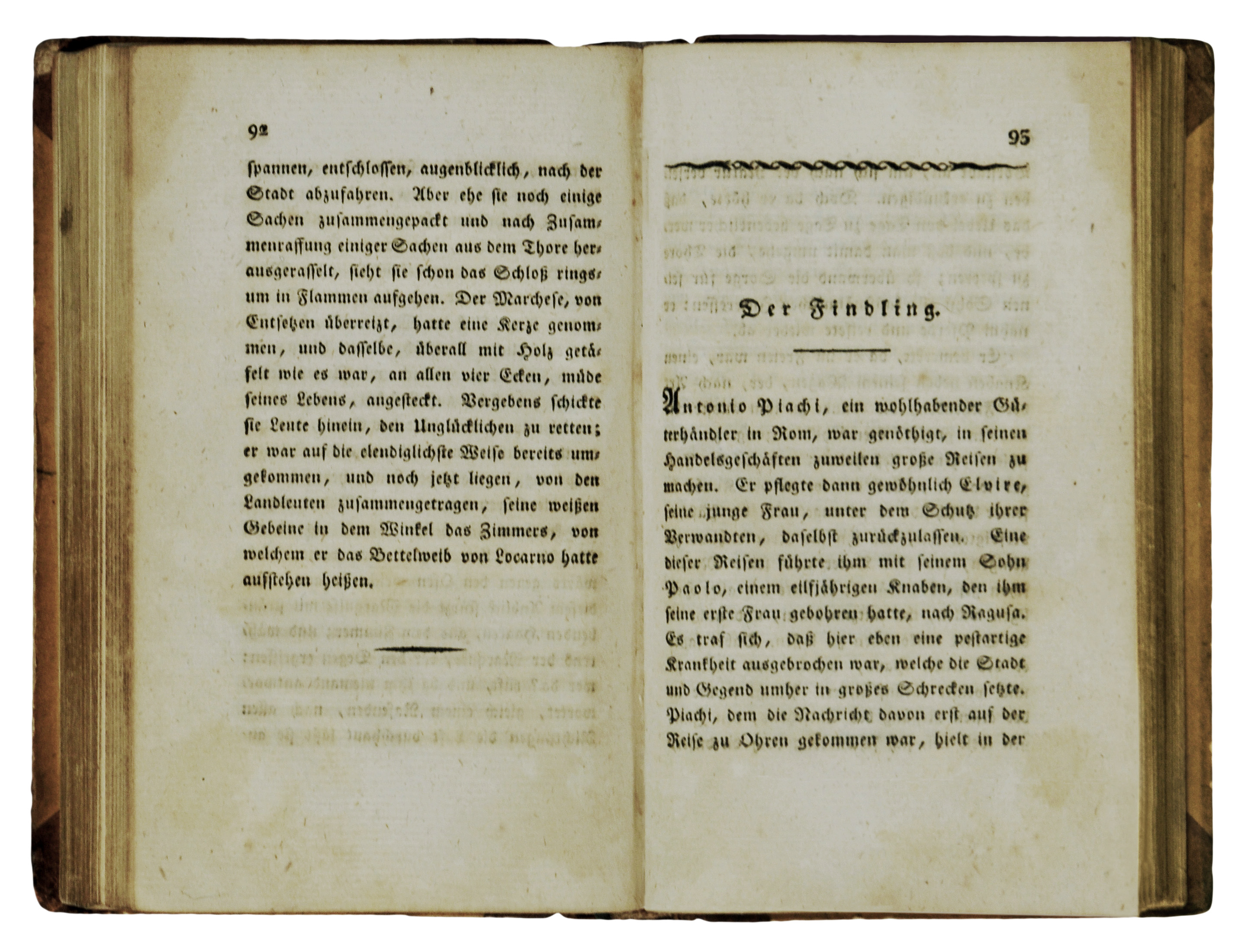 Erste Seite des Erstdrucks Der Findling von Heinrich von Kleist (1811)